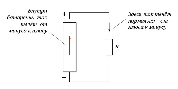 Внутри источника ЭДС ток течёт в направлении, противоположном нормальному. Он не может течь в этом направлении, без дополнительной силы неэлектрической природы, преодолевающей силу электрического отталкивания.